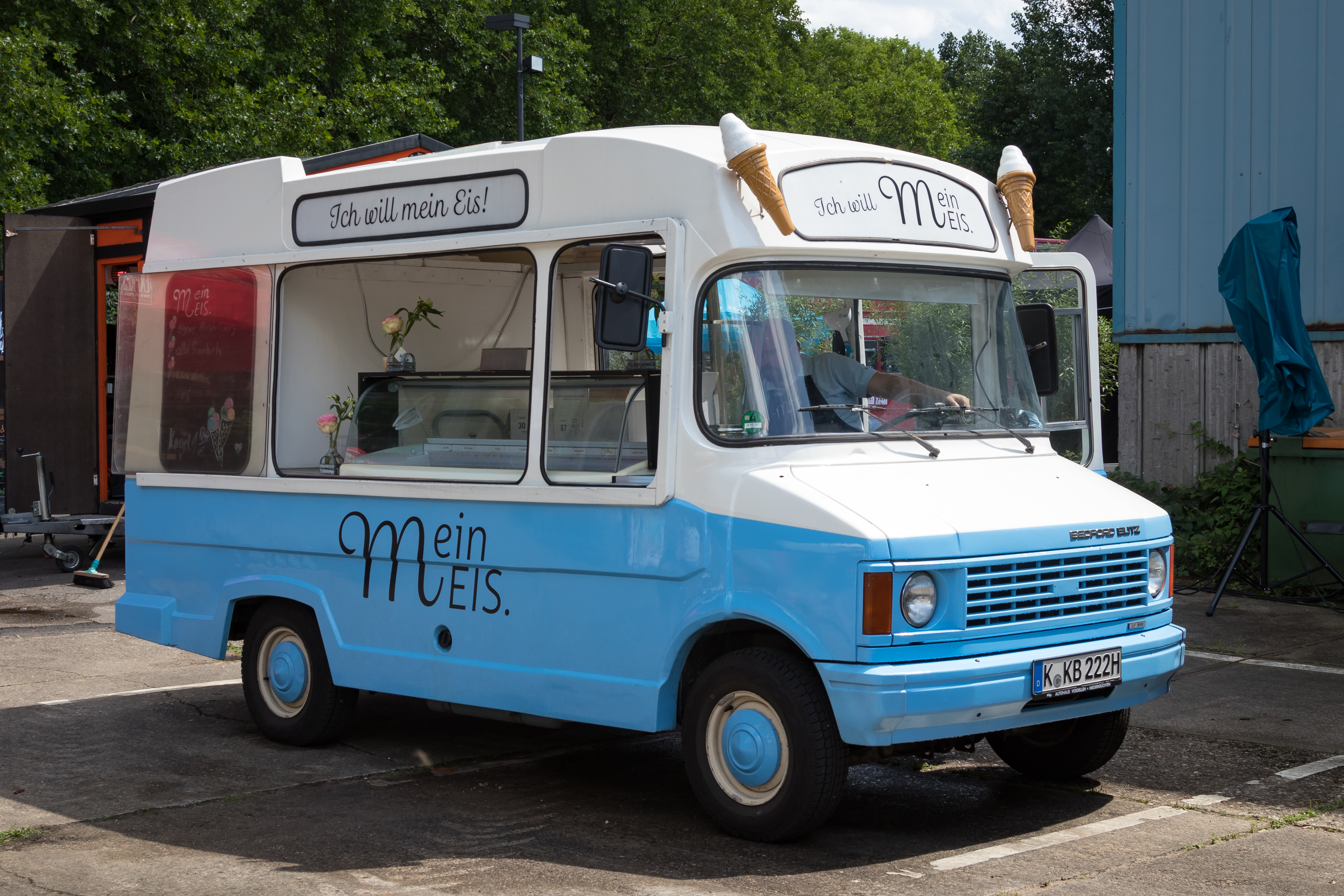 Bedford Blitz als Eiswagen bei einem Kölner Streetfood-Markt